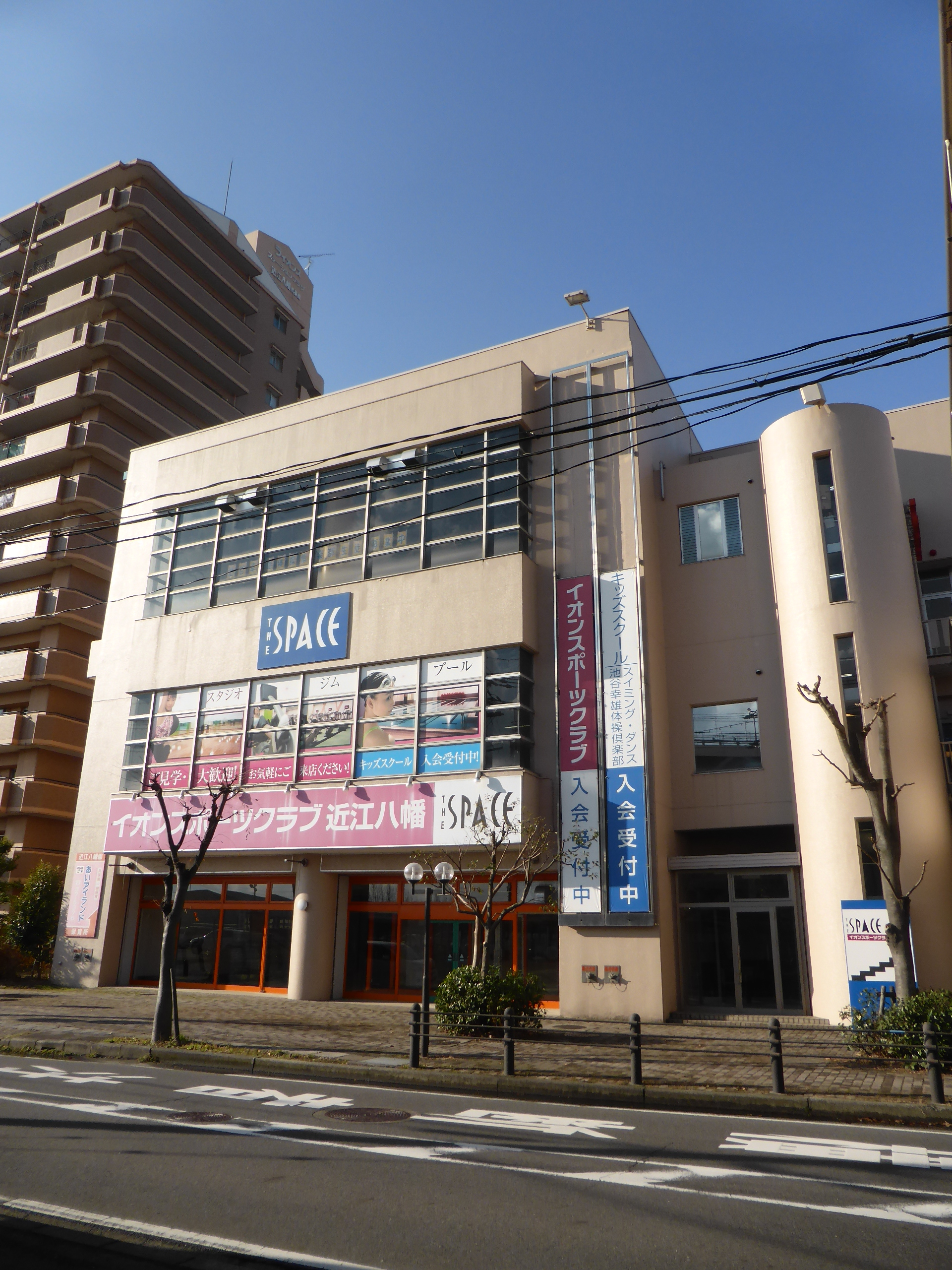 イオン近江八幡ショッピングセンター3番街を撮影